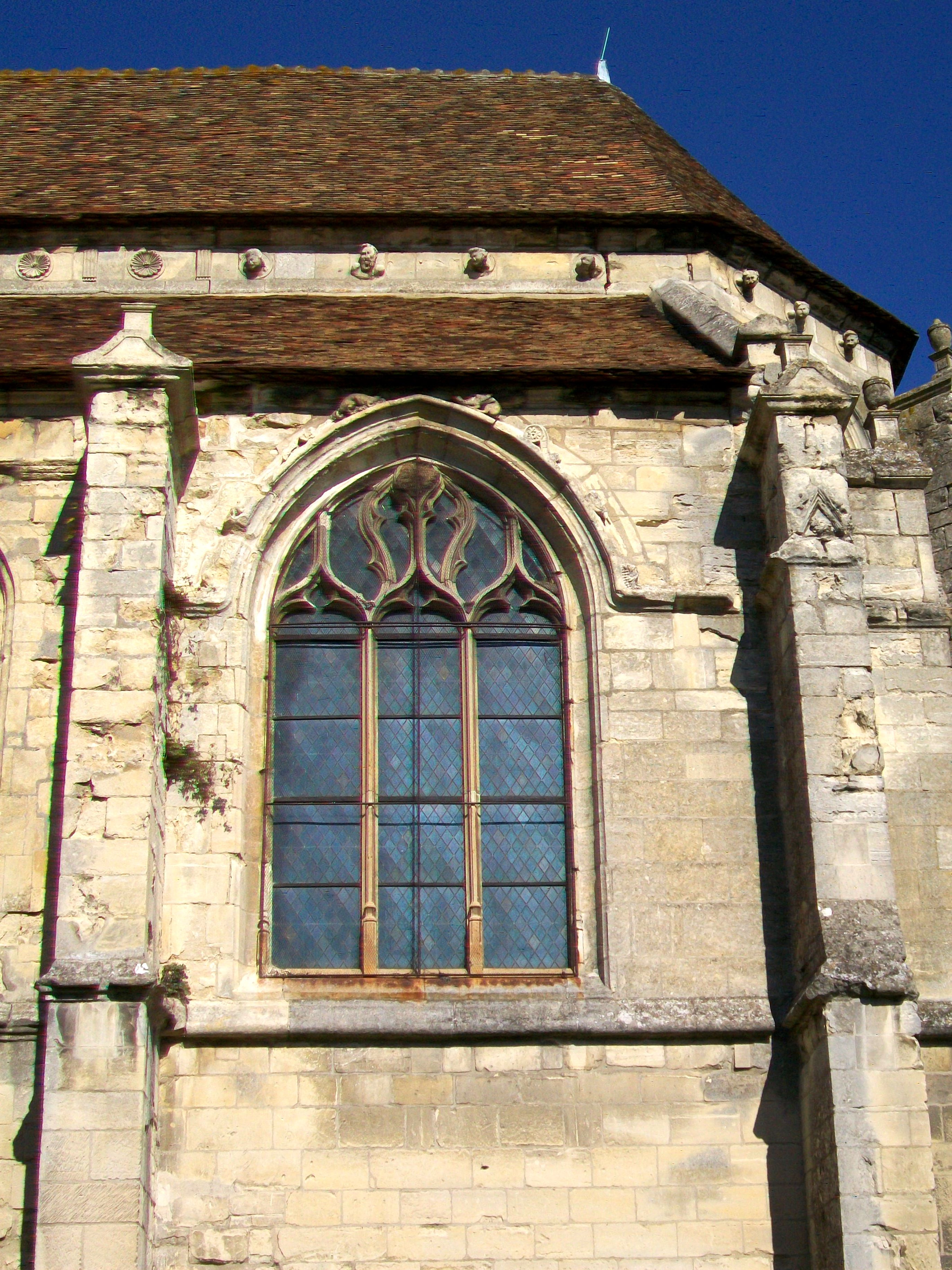 Fenêtre sud du chœur, muni d'un remplage flamboyant particulièrement soigné.